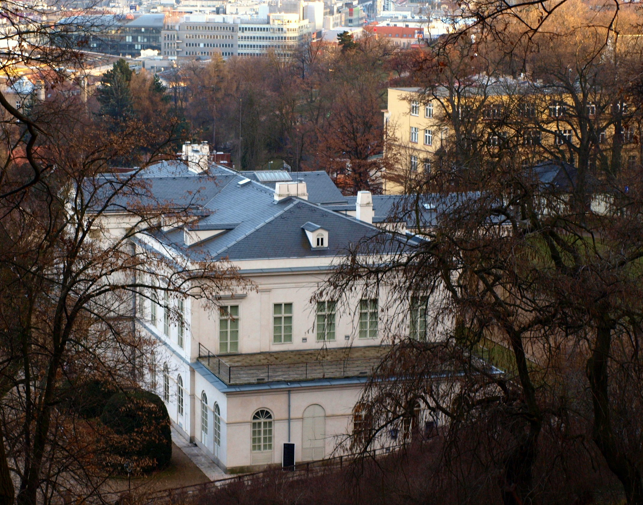 Letohrádek Kinských v Praze (Musaion)